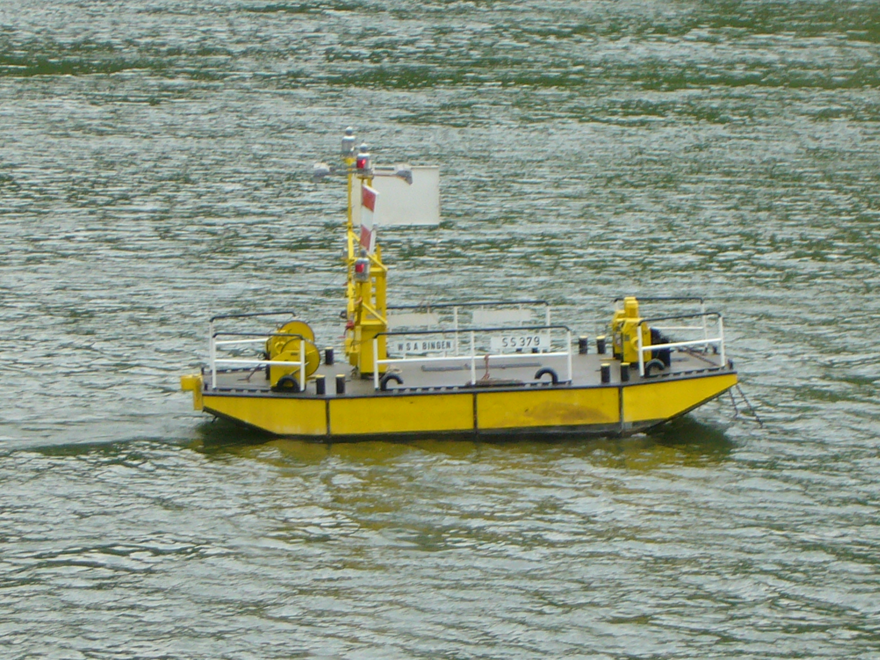 Wahrschauponton